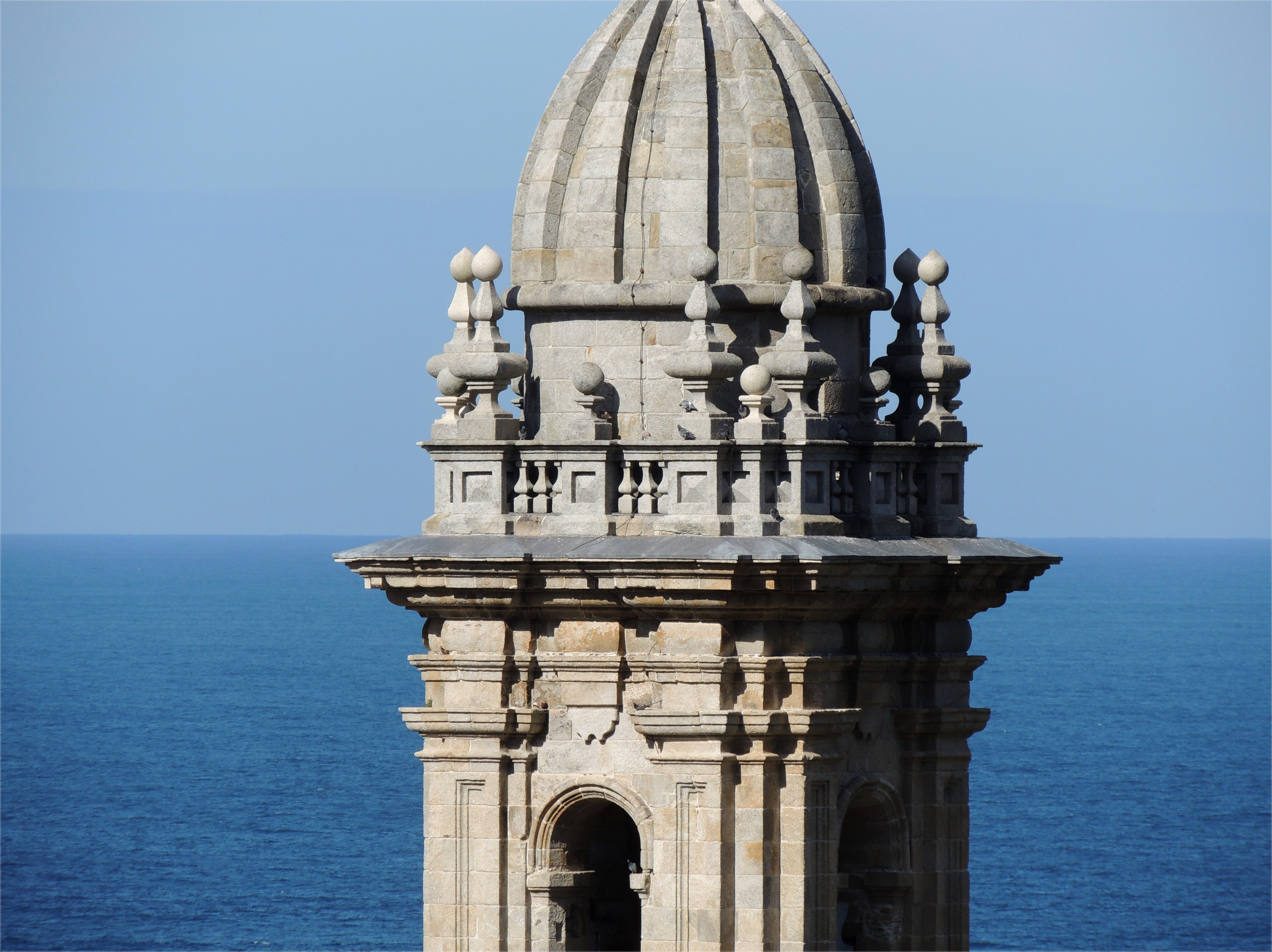 Monasterio de Oia, Pontevedra, Galicia, España.